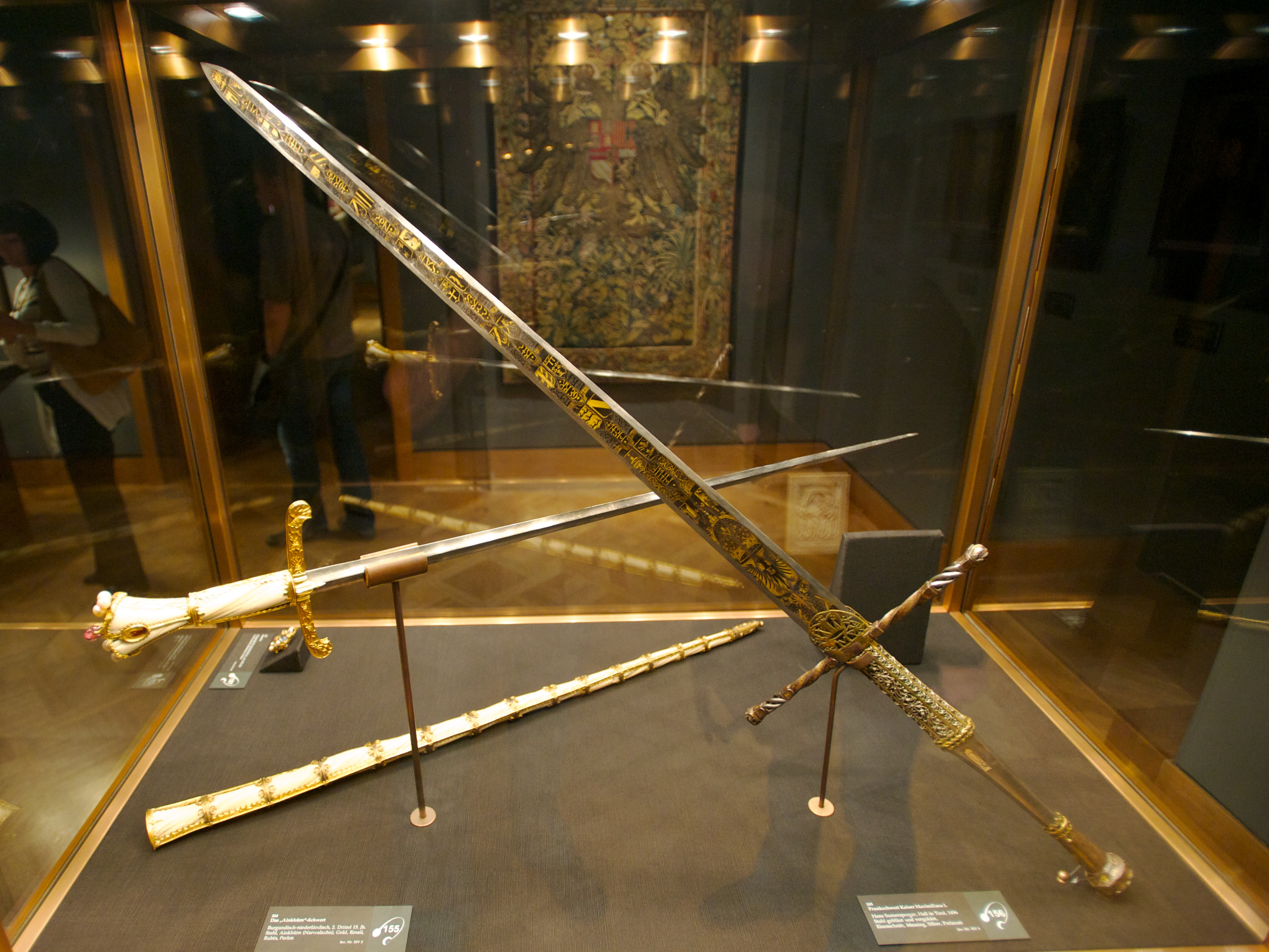 (vorne) Das Prunkschwert Kaiser Maximilians I. Künstler: Hans Sumersperger 1492 - 1498 in Hall/Tirol nachweisbar Hall/Tirol 1496 datiert Insigne Stahl, gebläut und vergoldet, Eisenschnitt, Messing, Silber, Perlmutter (ergänzt) L. 139 cm Signatur: MAISTER (HAN)NS VON H(ALL) (Marienseite) Inschrift: Georgsseite: "HILF HEILIGERR RITTER S SANNDT JORRG HILF VN(S)", "MARIIA HILLF AVS", "MAISTER"; Marienseite: "HILLF MARIA MVETER RAINE MAIDT MICH PEHVDT VOR L(EID), "HILF RITER SAN IORG"; Parierstange: MR; M, .496 IAR Inv.-Nr. SK_WS_XIV_4 (hinten) Das "Ainkhürn"- Schwert Bearbeitet von: Gerard Loyet, (Erneuerung der Schwertscheide, um 1467) Burgundisch - Niederländisch 2. Viertel 15. Jahrhundert Insigne Schwert: Stahl, Ainkhürn (Narwalzahn), Gold, Email; Ergänzungen: Silber, vergoldet, Rubin, Perlen L. 106 cm Klinge: L. 86,7 cm Scheide: L. 92,3 cm Inv.-Nr. SK_WS_XIV_3